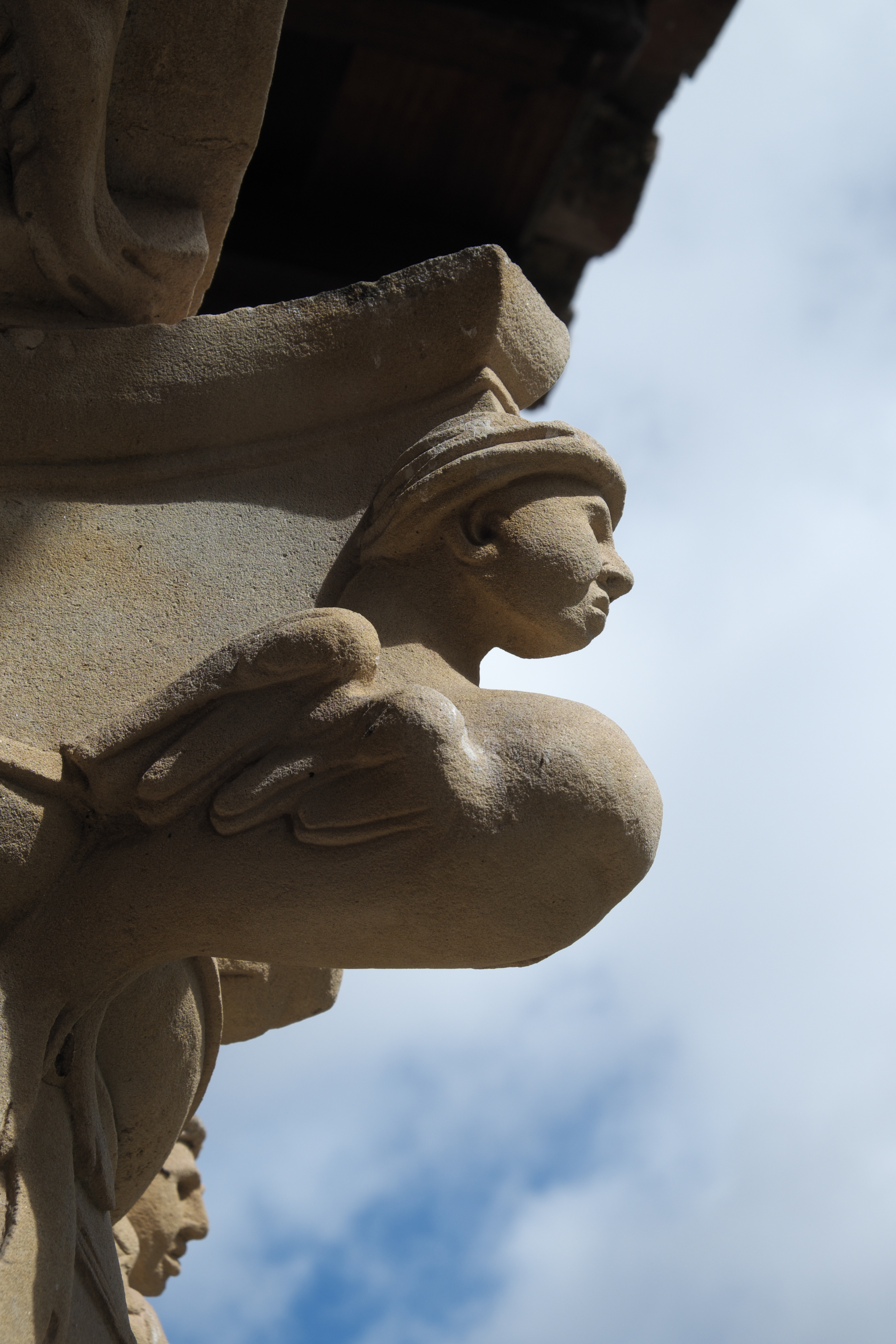 Dominikanerinnenkloster Convento de las Dueñas in Salamanca (Kastilien-León/Spanien), Skulptur im Kreuzgang, Darstellung: Harpyie